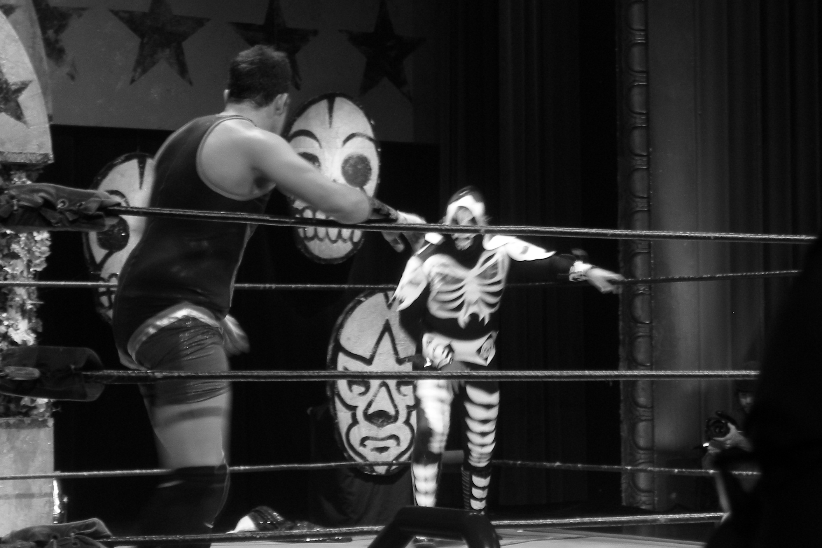 Conrad Kennedy III (de dos) affronte LA Par-K.